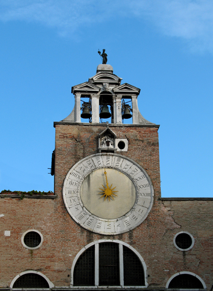 San Giacomo di Rialto, Venice.